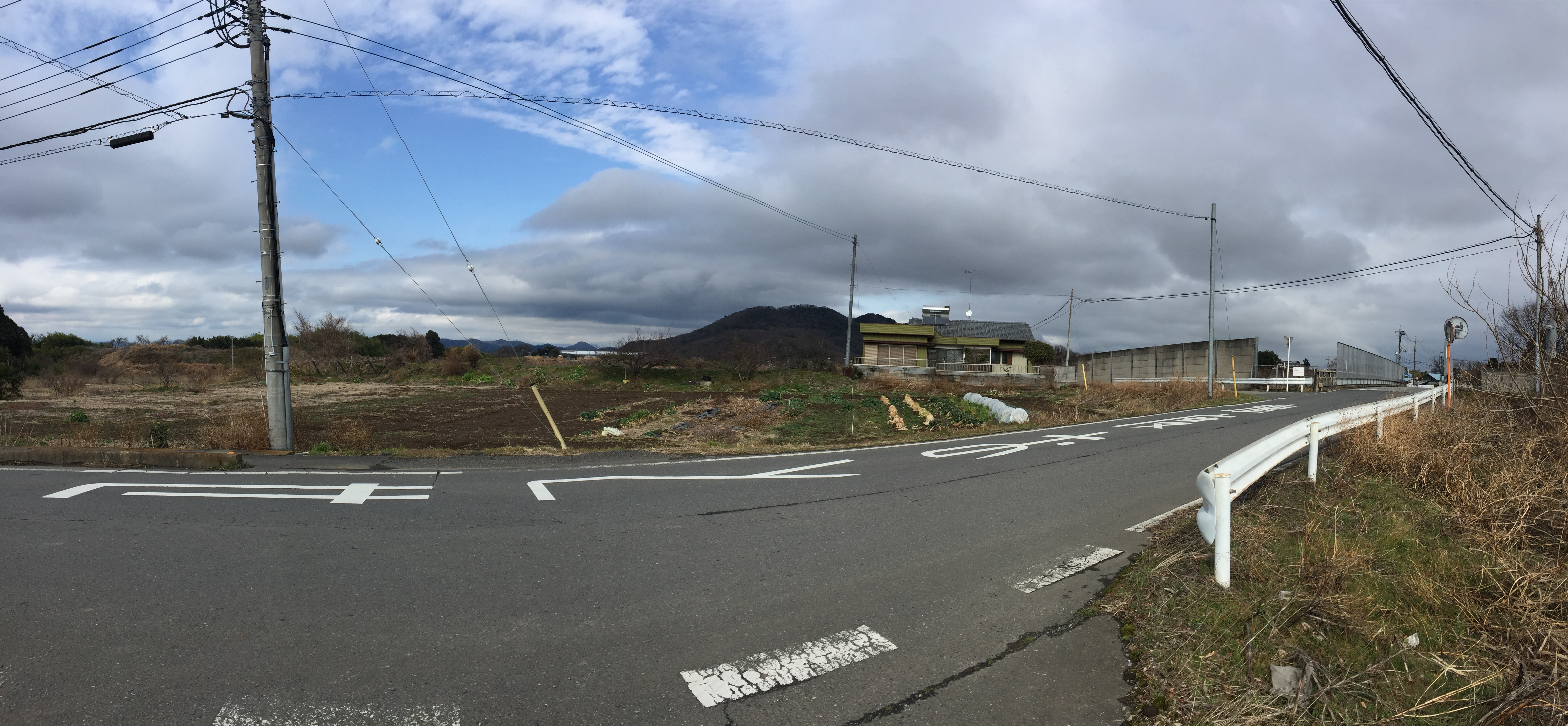 栃木県栃木市藤岡町都賀には後藤遺跡が所在するが、現在はその面影をとどめていない。すぐそばを東北自動車道が走る。